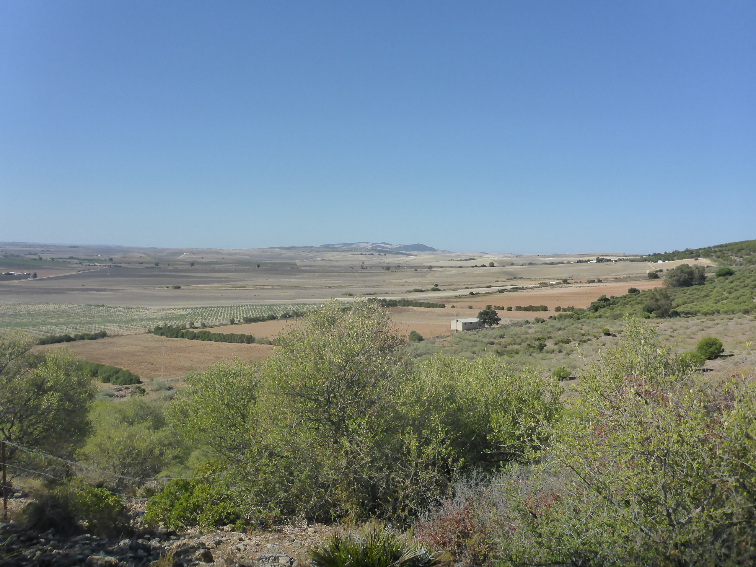 Sierra de Gibalbín al subir a casa del Ingeniero de la presa de Bornos